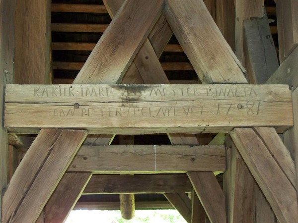 Bevésés a nagylónyai fatorony gerendáján